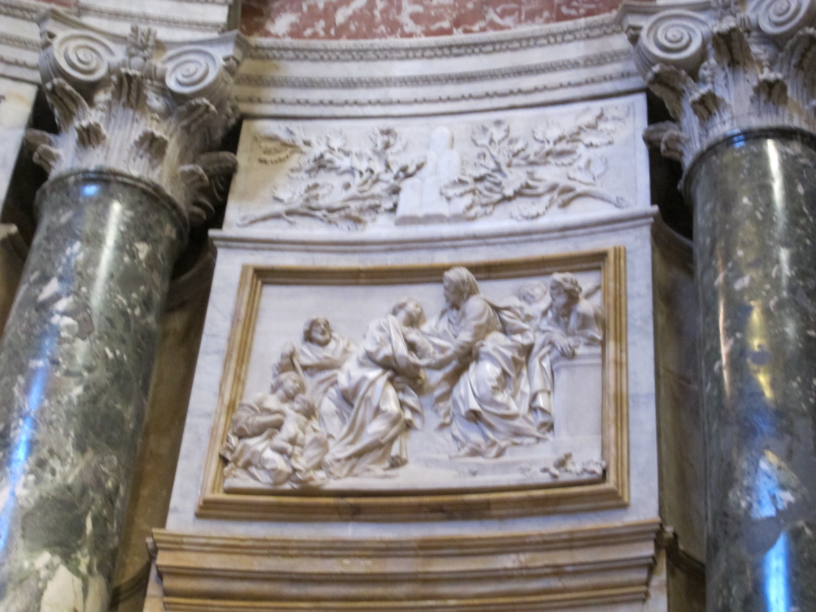 Cappella chigi (siena), rilievo 04 visitazione